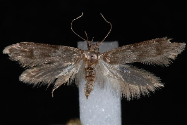 Asaphocrita aphidiella